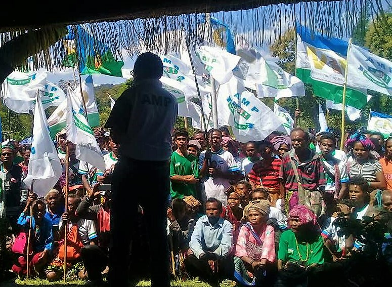 Wahlkampfveranstaltung der AMP in Oesilo, Oecusse, Osttimor